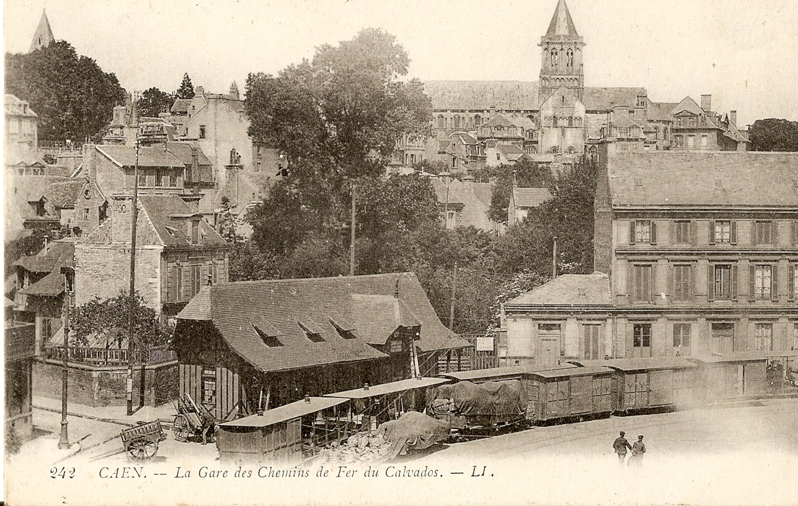 Carte postale ancienne éditée par LL N°242 CAEN : la gare des Chemins de fer du Calvados